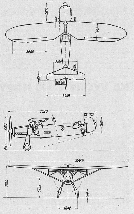 Focke-Wulf Fw 56, skica